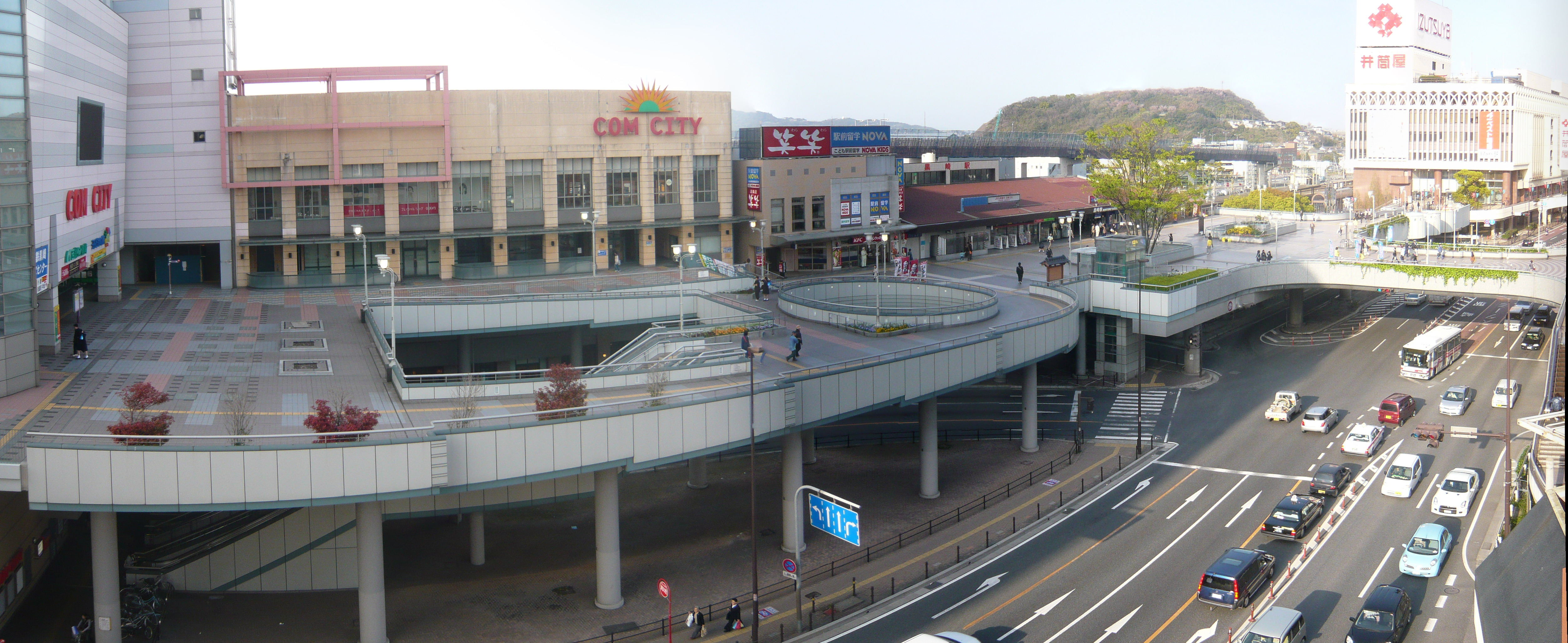 Kurosaki Station 黒崎駅,Kitakyushu,Fukuoka,Japan（福岡県北九州市）で撮影。